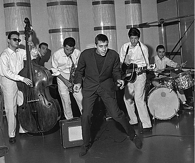 Cinematografico Italia